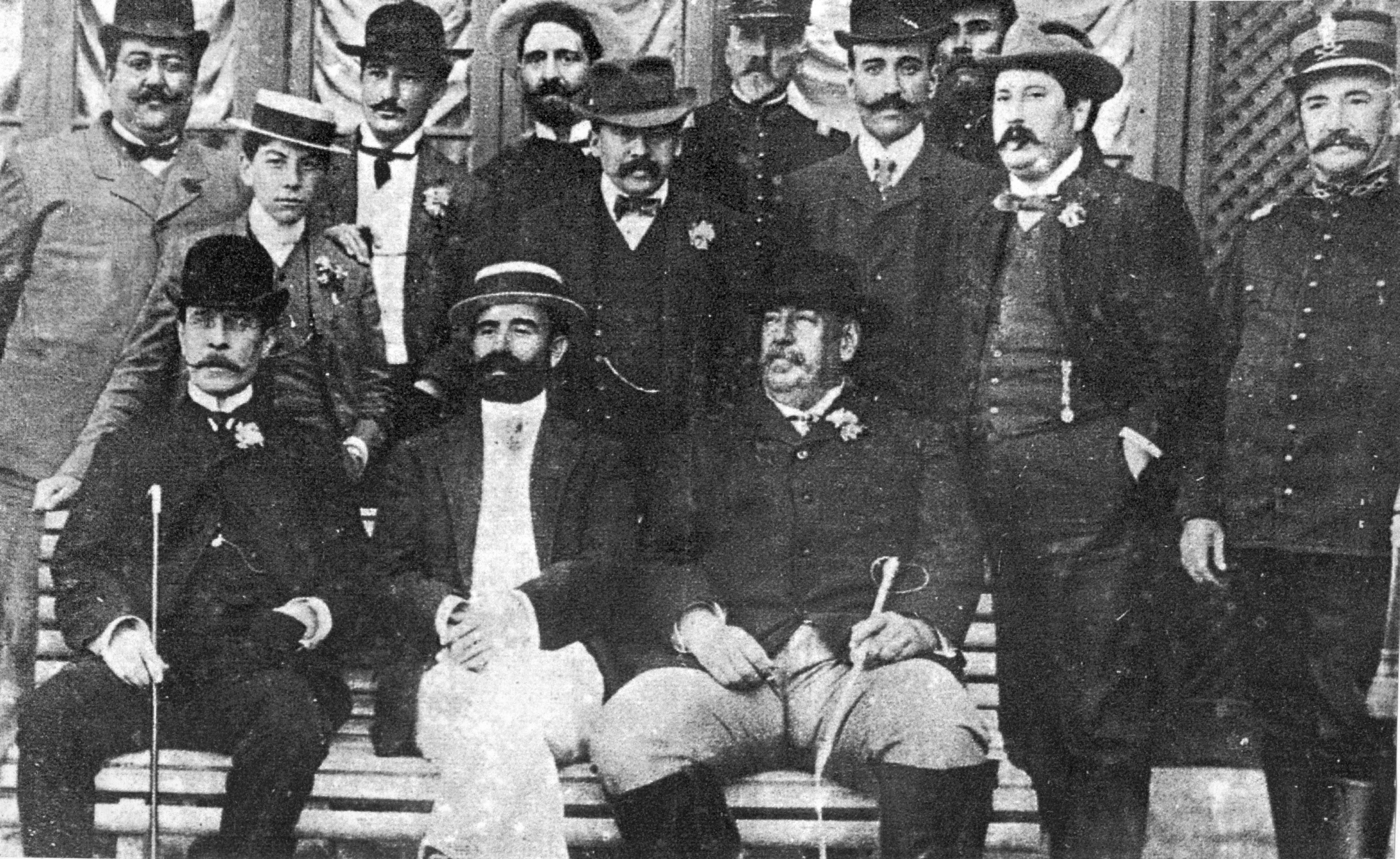 Fotografía del político uruguayo José Batlle y Ordóñez durante su segunda presidencia hacia 1911. De izquierda a derecha (de pie) Feliciano Viera, Pedro Manini Ríos, Mateo Margariños Solsona, Antonio M. Rodríguez, el coronel Laborde, José Serrato y Domingo Arena, (sentados) Claudio Williman, Diego Pons y José Batlle y Ordoñez.